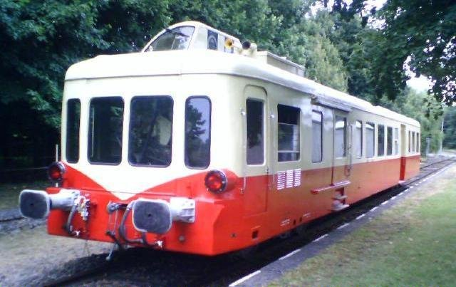 AUTORAIL X3943 EX SNCF CONSERVE AU CFTSA ATTIGNY 08 ARDENNES FRANCE